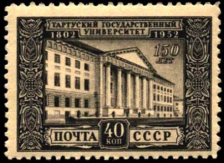 Почтовая марка СССР, посвящённая 150-летию Тартусского государственного университета, выпущенная в сентябре 1952 года. На марке изображено здание университета, построенное в 1804—1809 гг., архитектор И. Краузе. Художник — П. Лухтейна. Номер — 1695 (ЦФА). Тираж — 1 млн экз. Описание — по изданию «Каталог почтовых марок СССР 1918—1974», М., ЦФА, 1976.